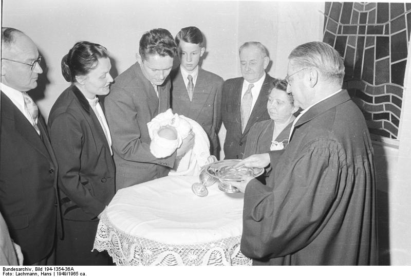 Taufe in Dillingen/Saar